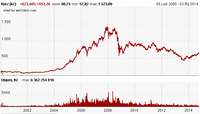 Graf kurzu Akcie ČEZna Burze Praha